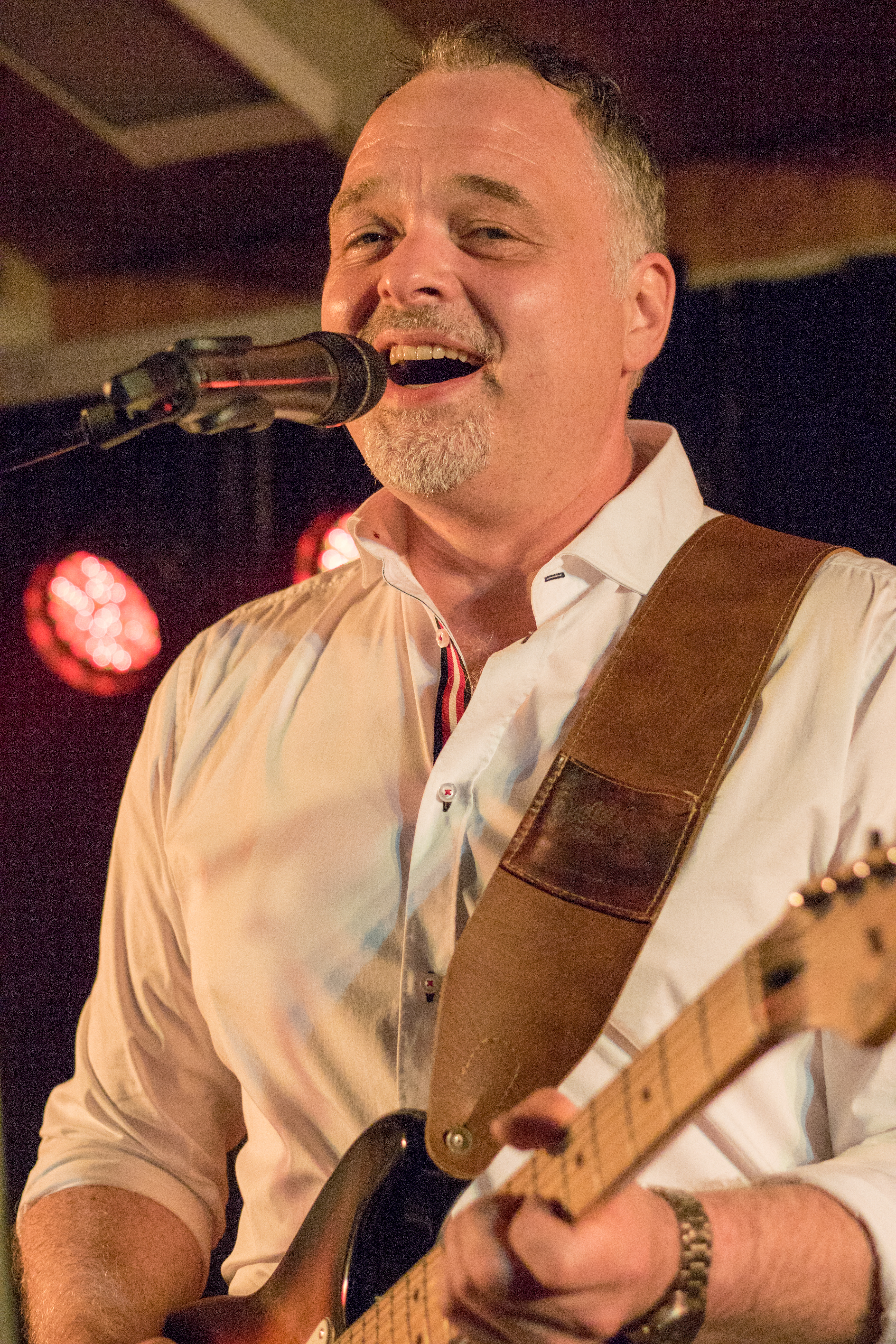 Charles Plogman suomalainen laulaja